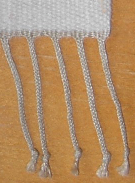 Femflätad linfrans. Se andra fransar på: Mönsterknuten frans med pärlknutar och Drejad frans